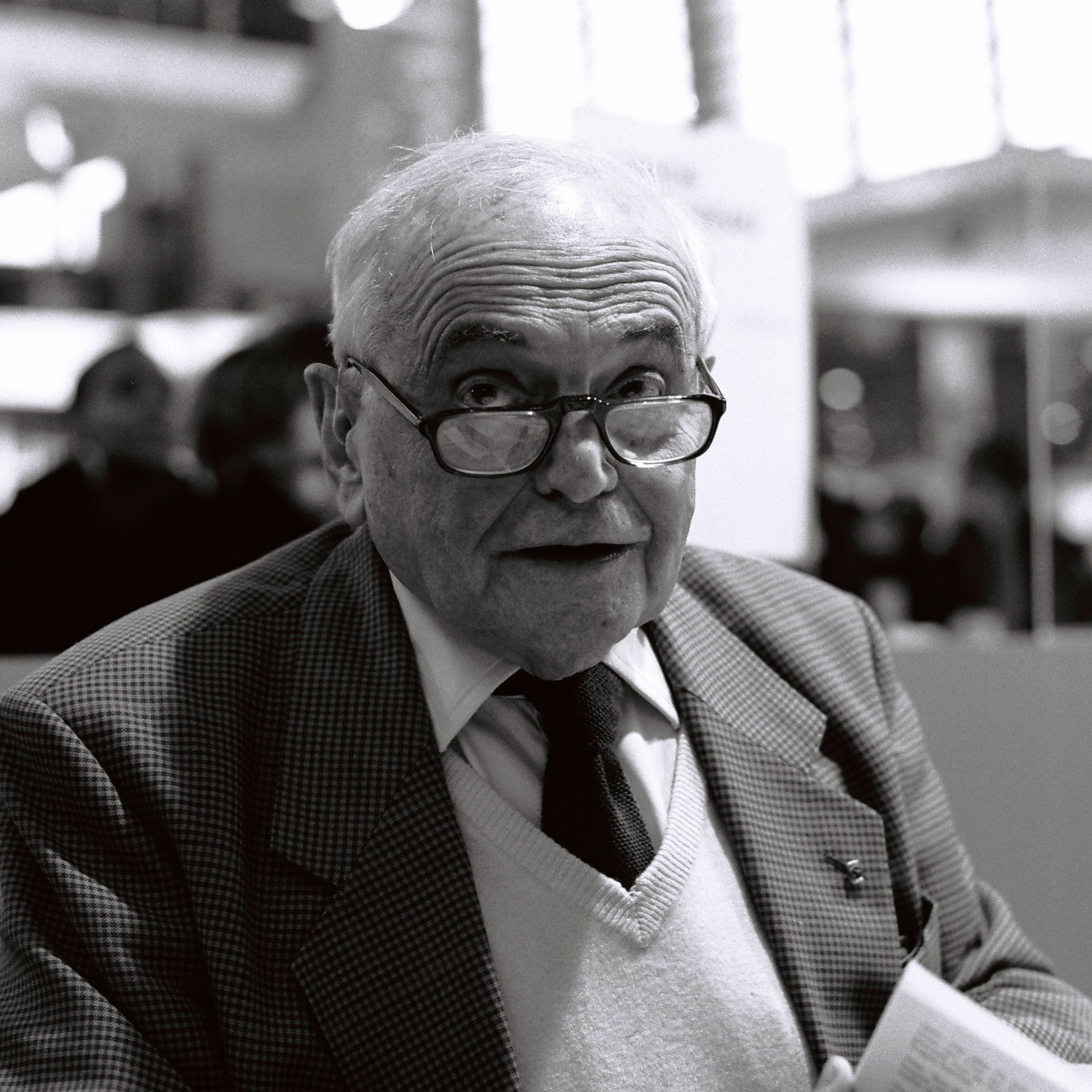 Michel Déon au salon du livre de Paris 2012